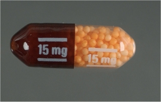 Photo einer Dexedrine® Kapsel, 15mg Dextroamphetamin